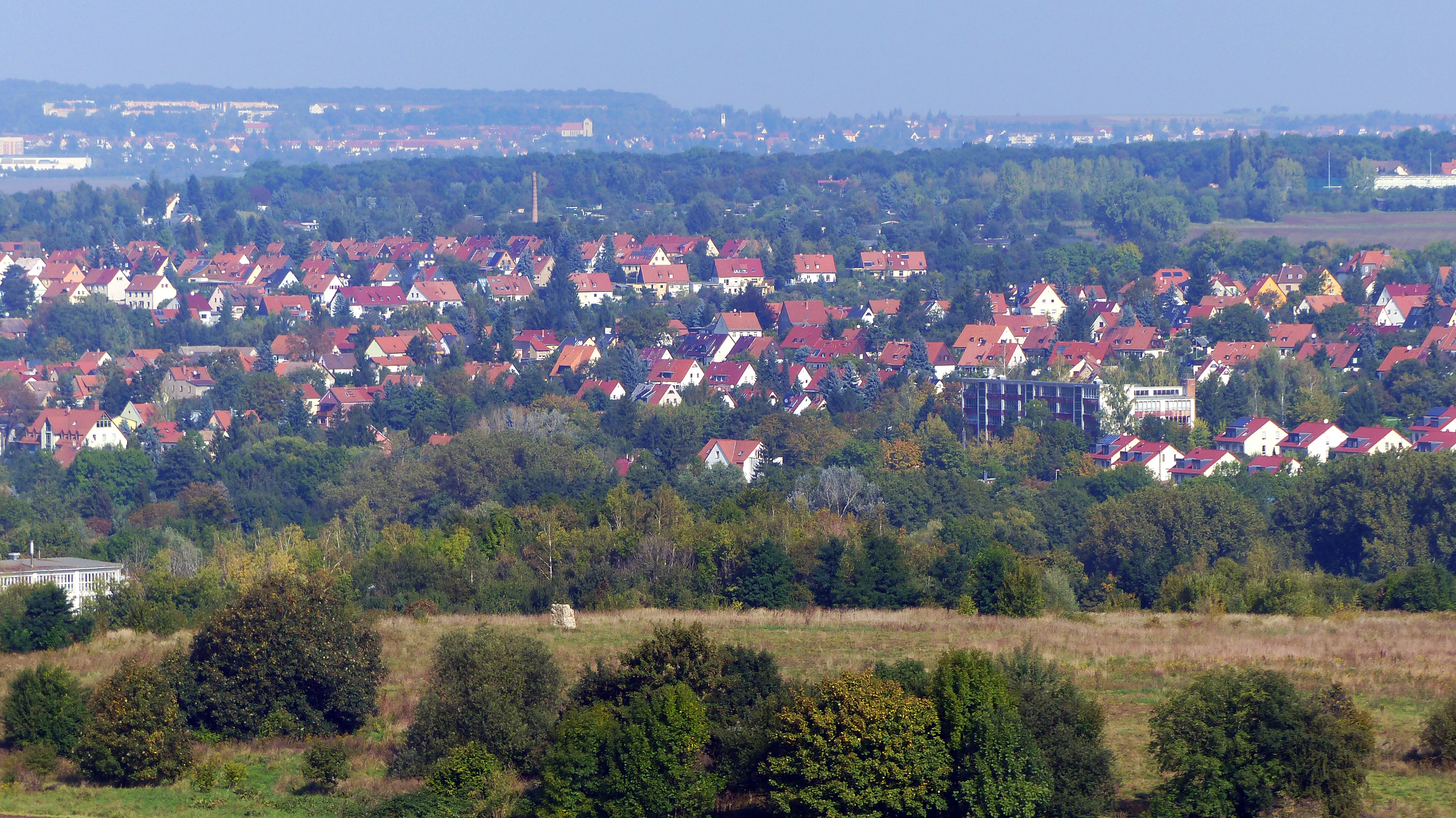 Blick auf Oberweimar vom Schloss Belvedere aus